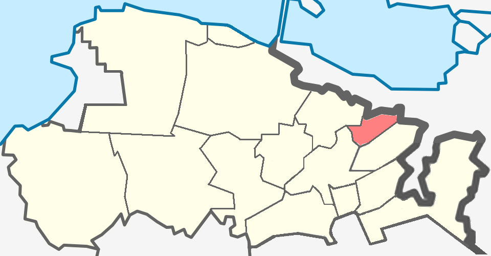 Горбунковское сельское поселение Ломоносовского района Ленинградской области.